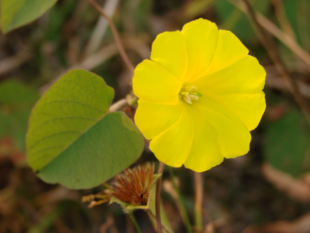 Merremia umbellata - CONVOLVULACEAE Parque Nacional de Brasília - Brasília - Distrito Federal - Brasil.